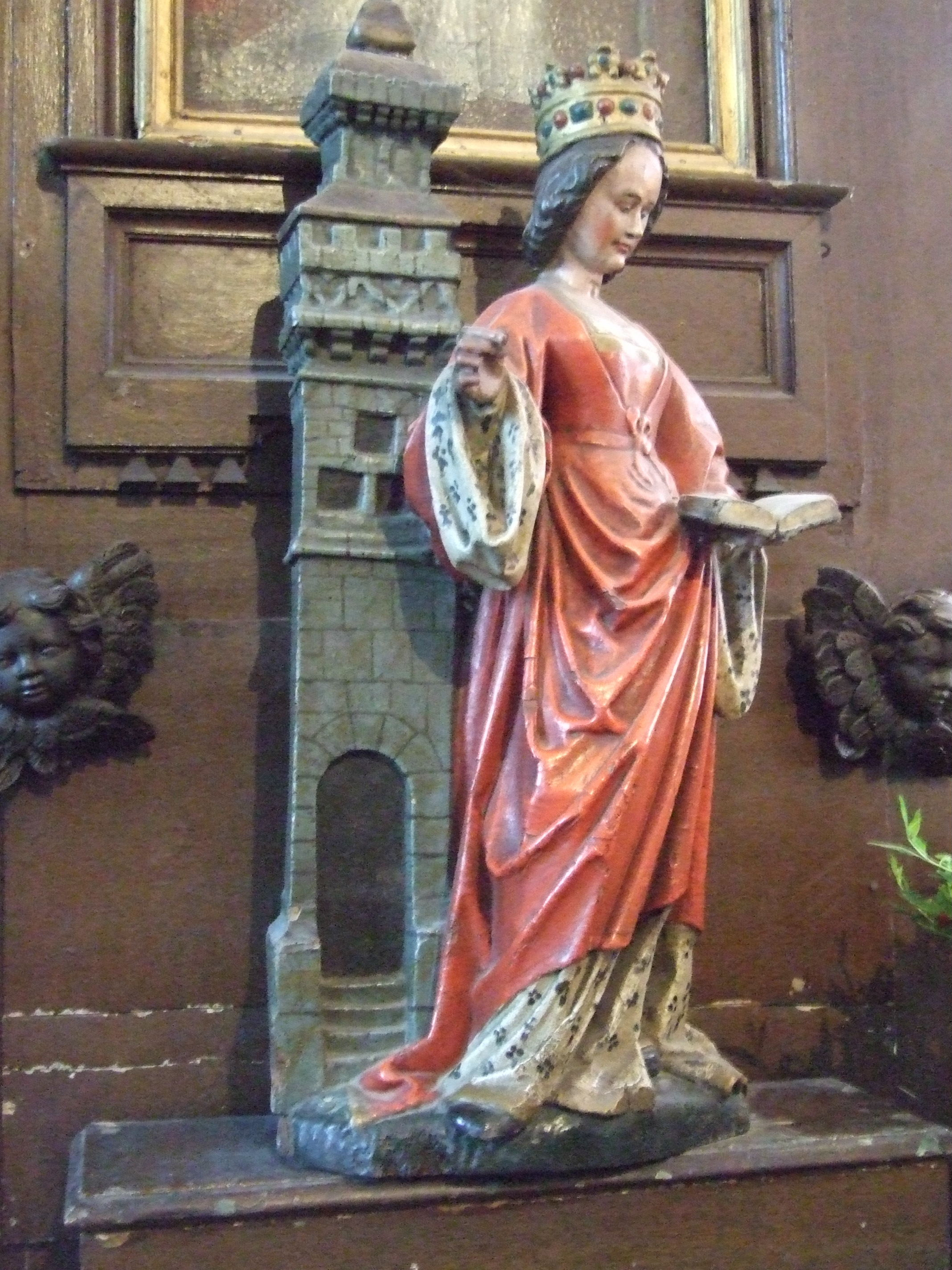 Eglise Saint-Martin de Baume-les-Dames (Doubs) : statuette de Sainte Barbe